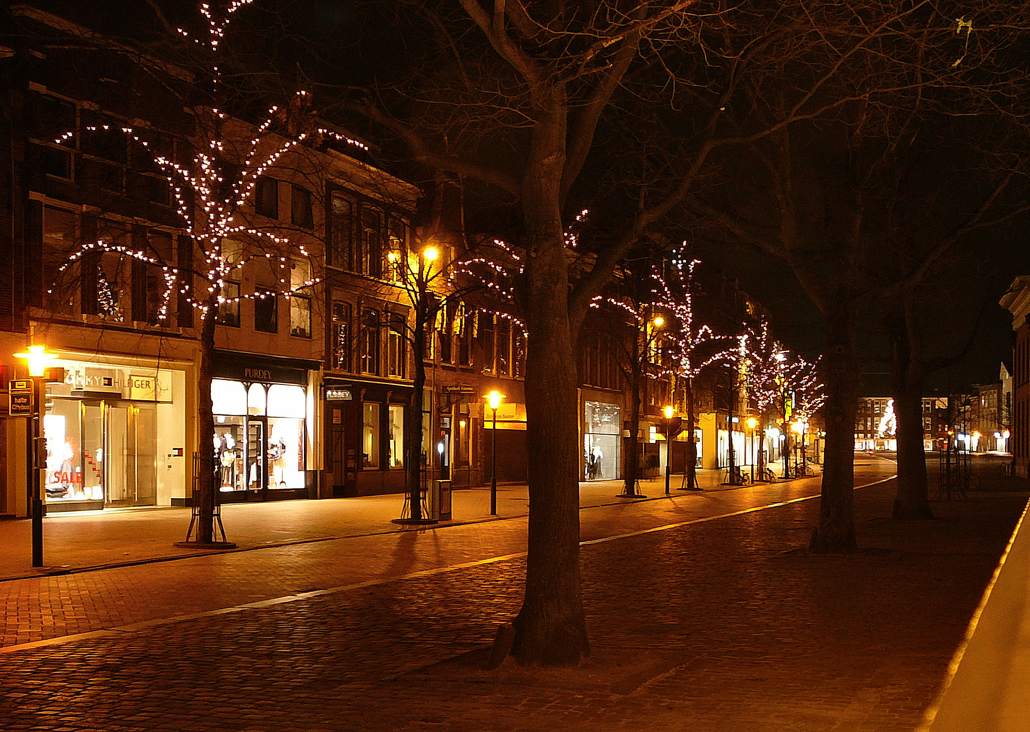 A-kerkhof NZ bij nacht A-Kerkhof, Groningen, the Netherlands